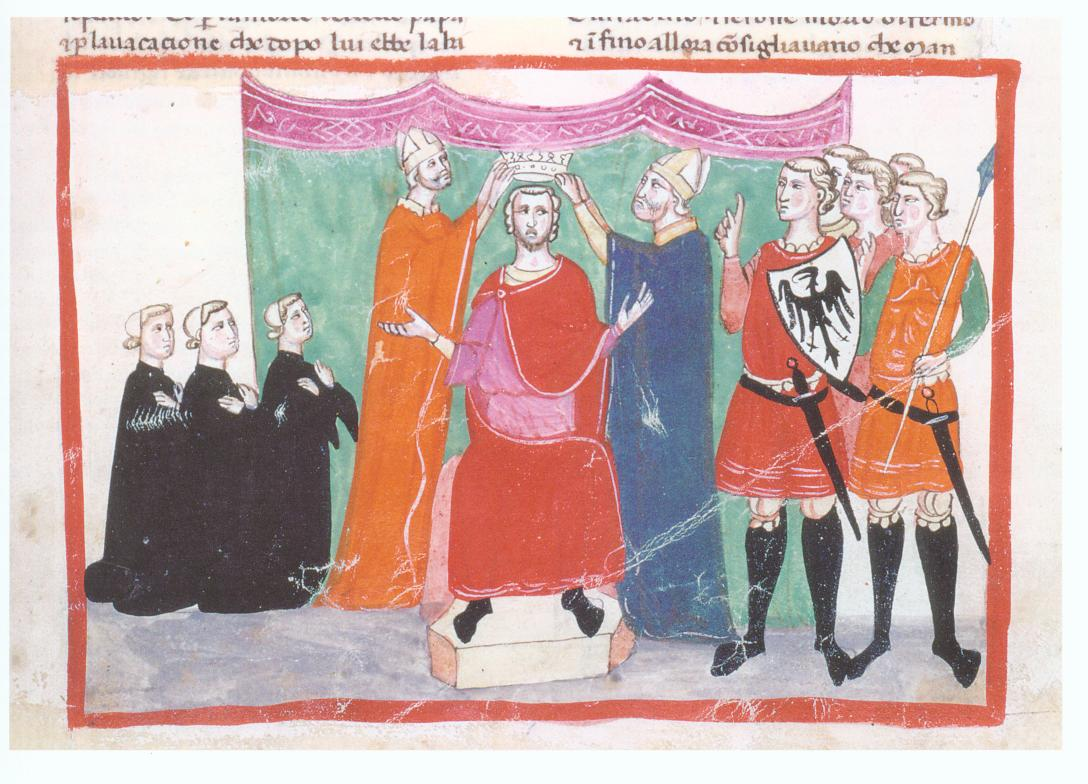 Manfred wird in Palermo zum König von Sizilien gekrönt (1258), Miniatur aus der Chronica des Giovanni Villani, Zweite Hälfte 13. Jahrhundert, Vatikanstadt, Biblioteca Apostolica Vaticana, Cod. Chigi L VIII 296, fol. 85r